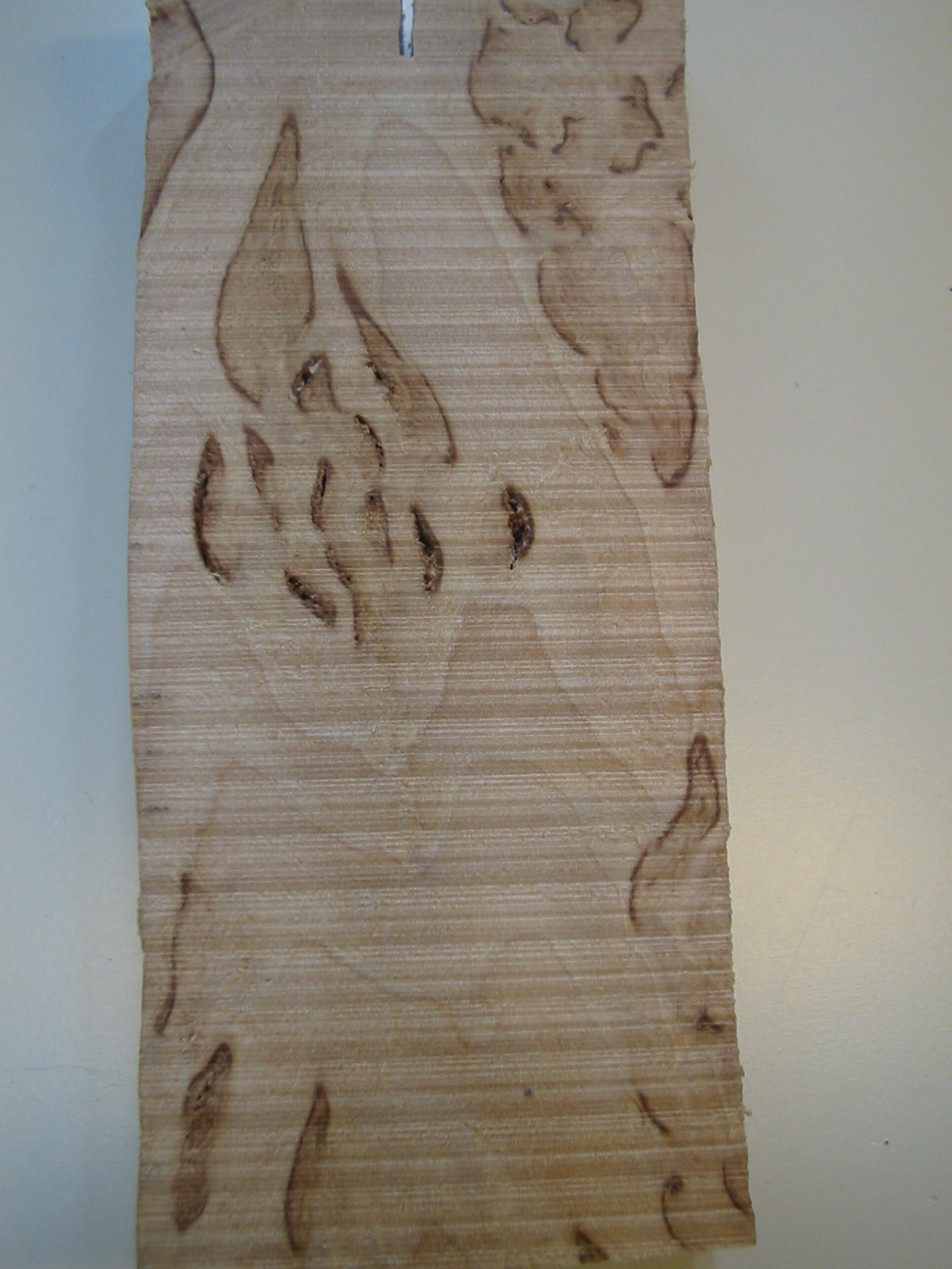 Snitt av valbjørkbit.